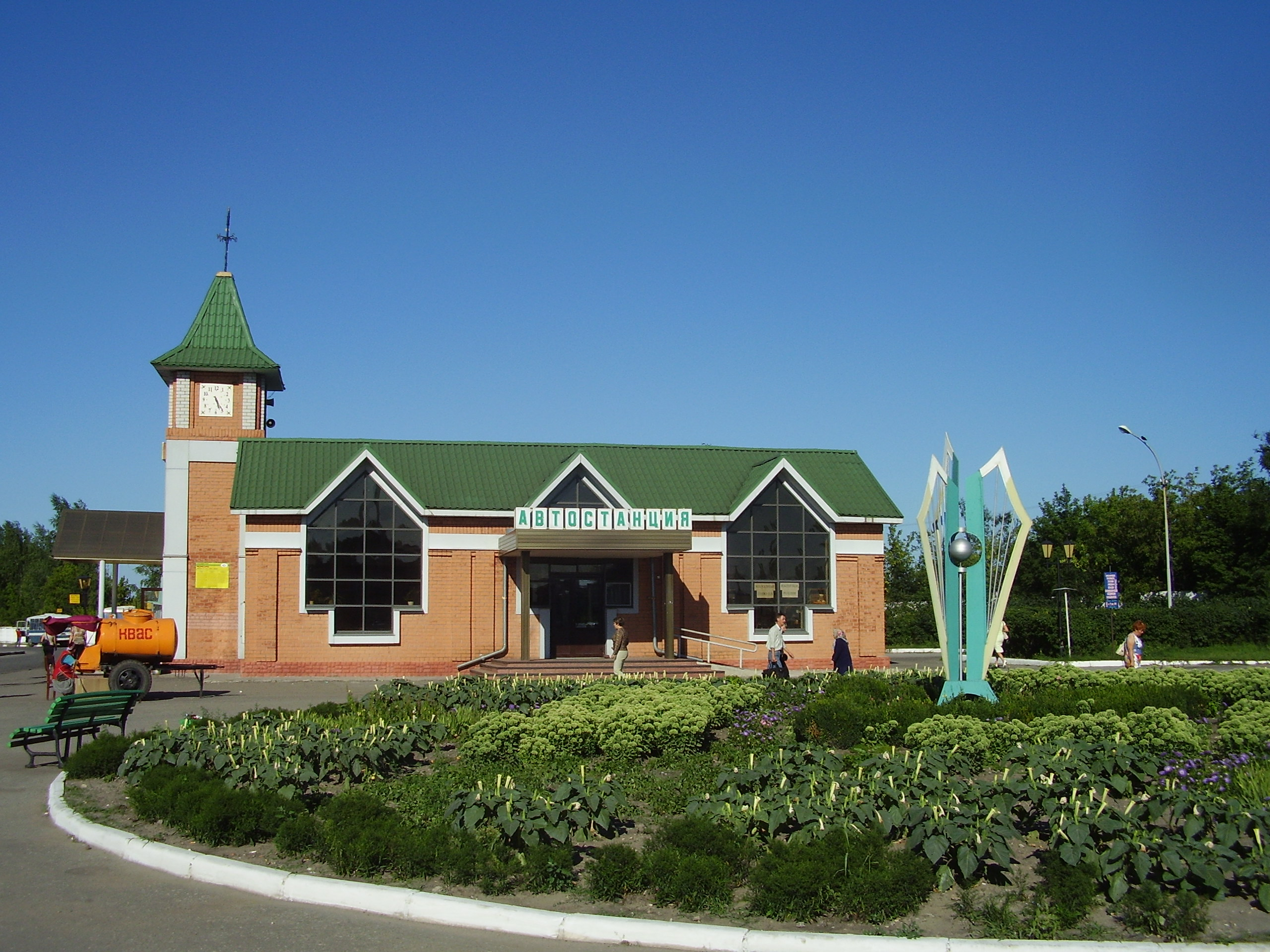 г.Грязи,автостанция